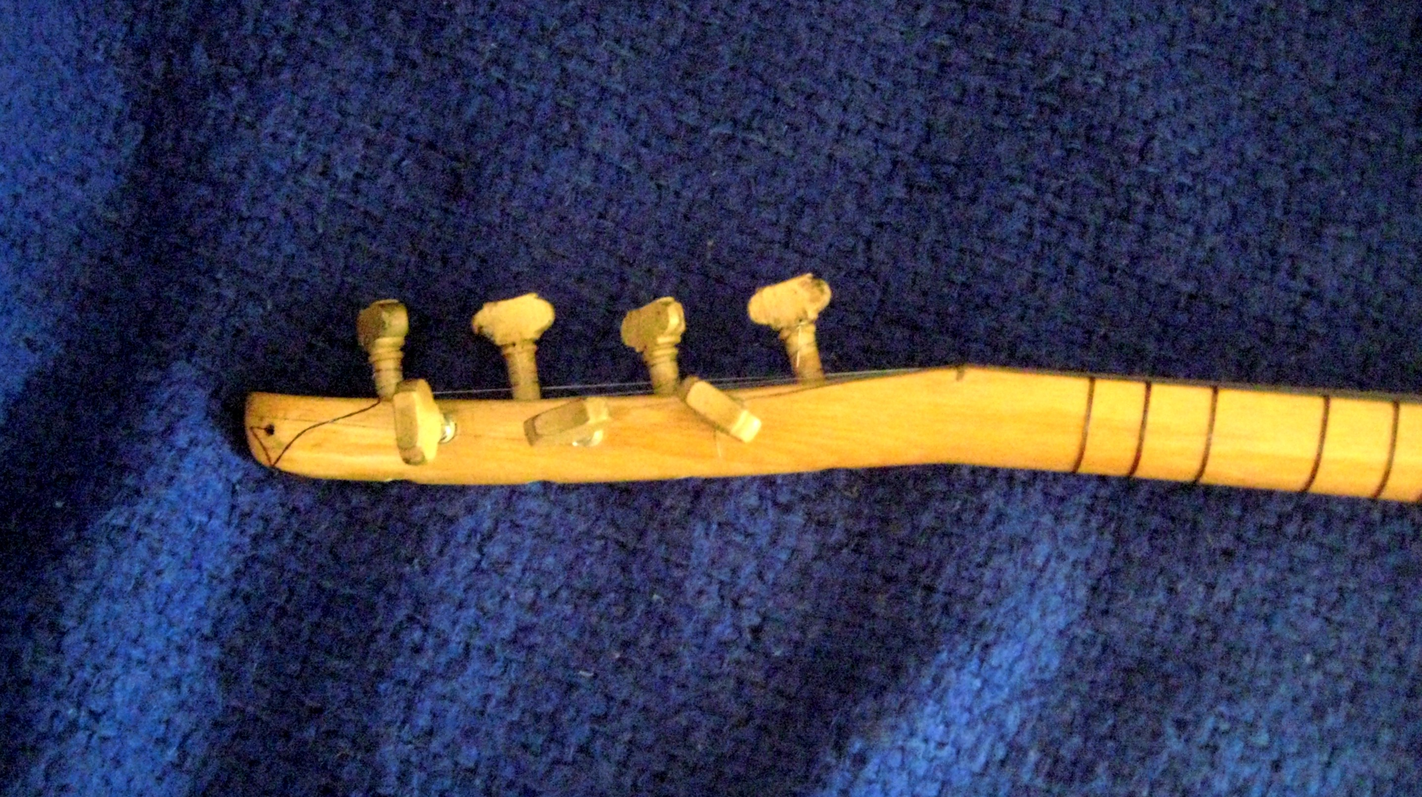 Turkish saz